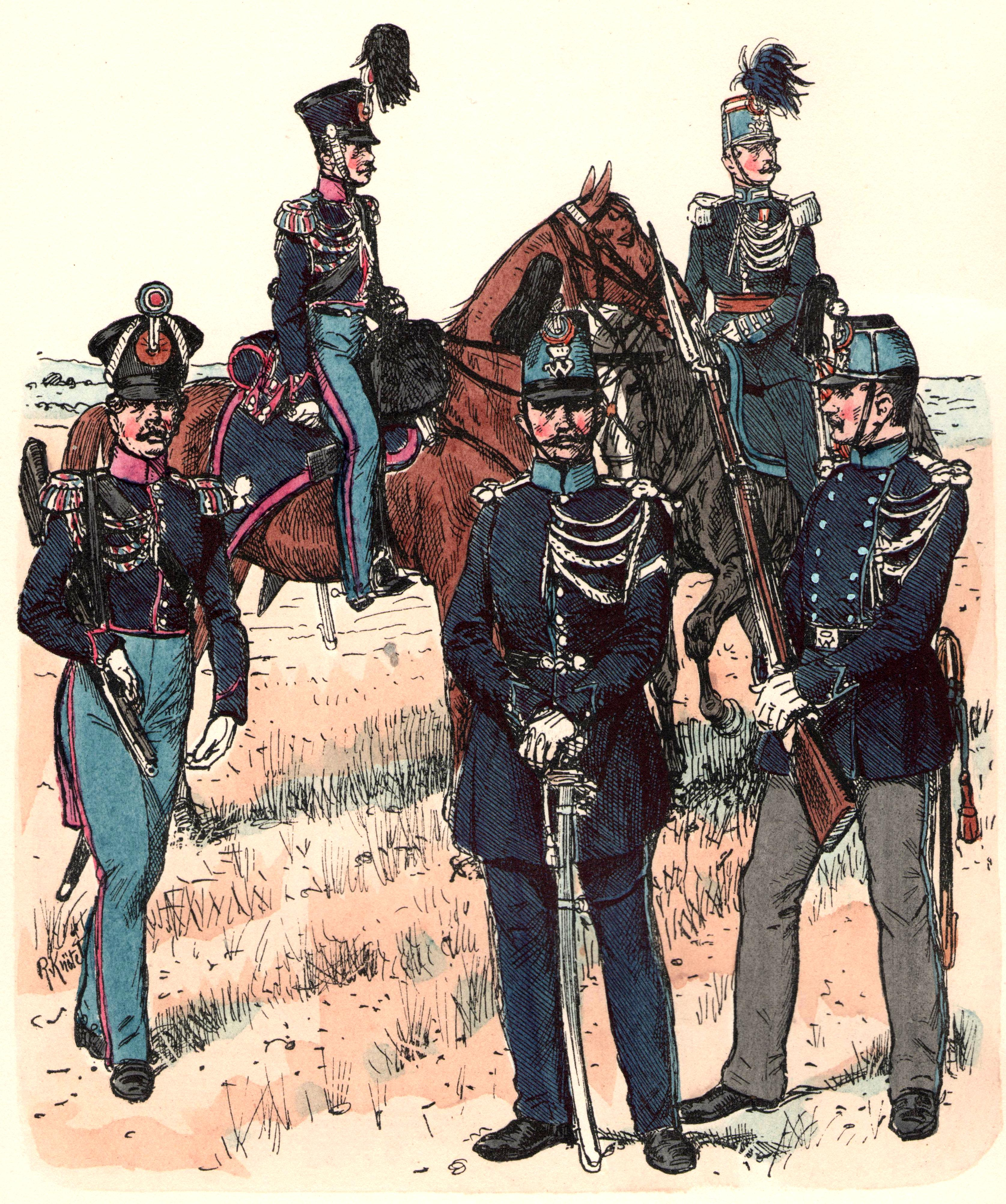 Uniforme vum Bundeskontingent a Knötels Uniformkunde